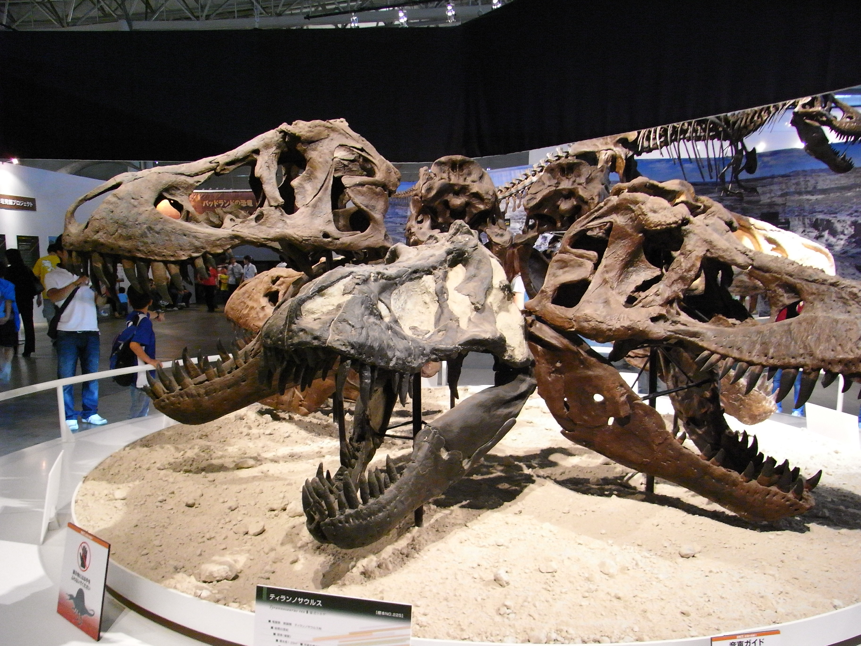 どれかひとつ怪我をしているらしいぞ！